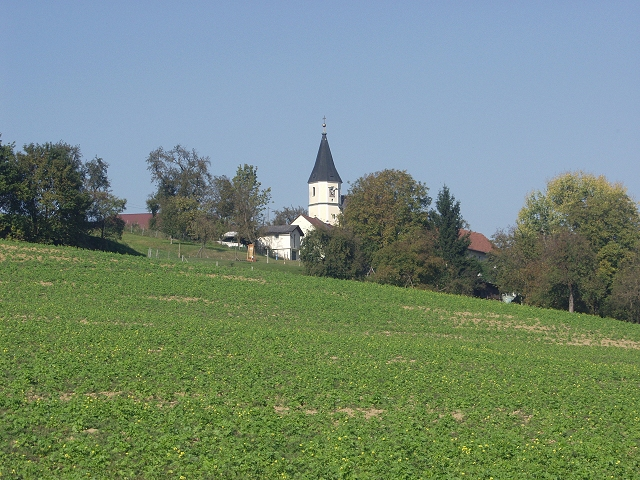 Wallfahrtskirche St. Leonhard bei Pucking / Upper Austria